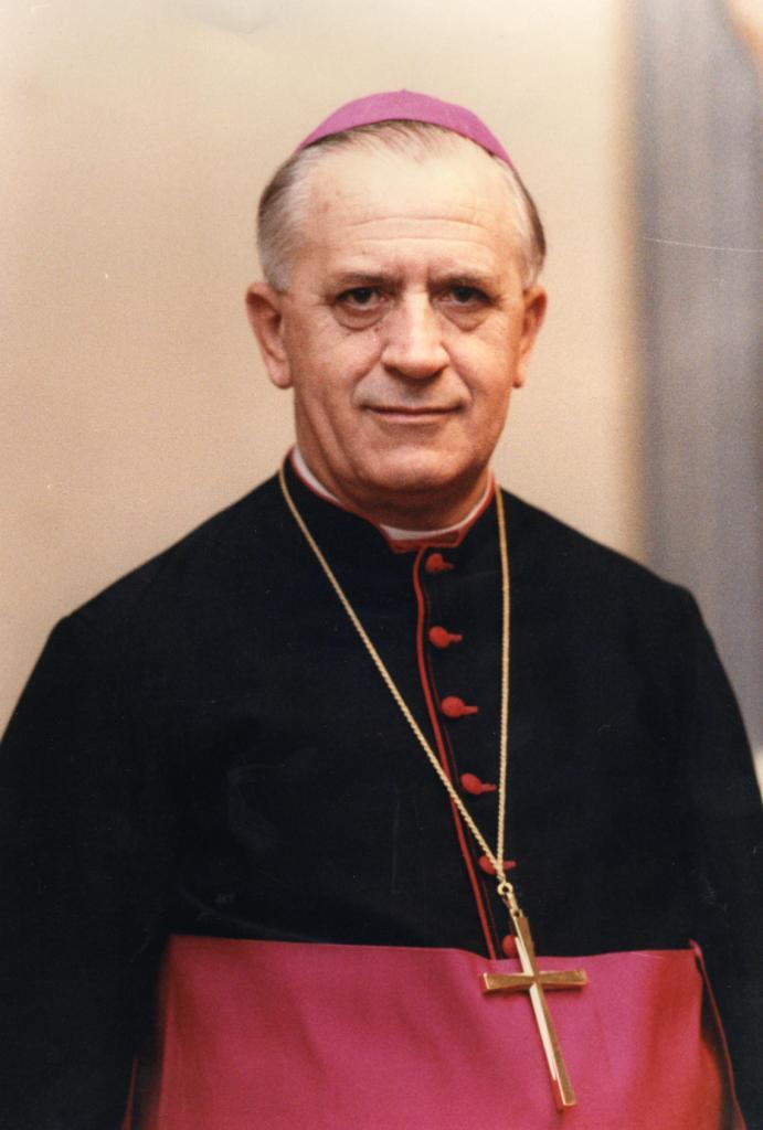 S.E. mons. Teresio Ferraroni